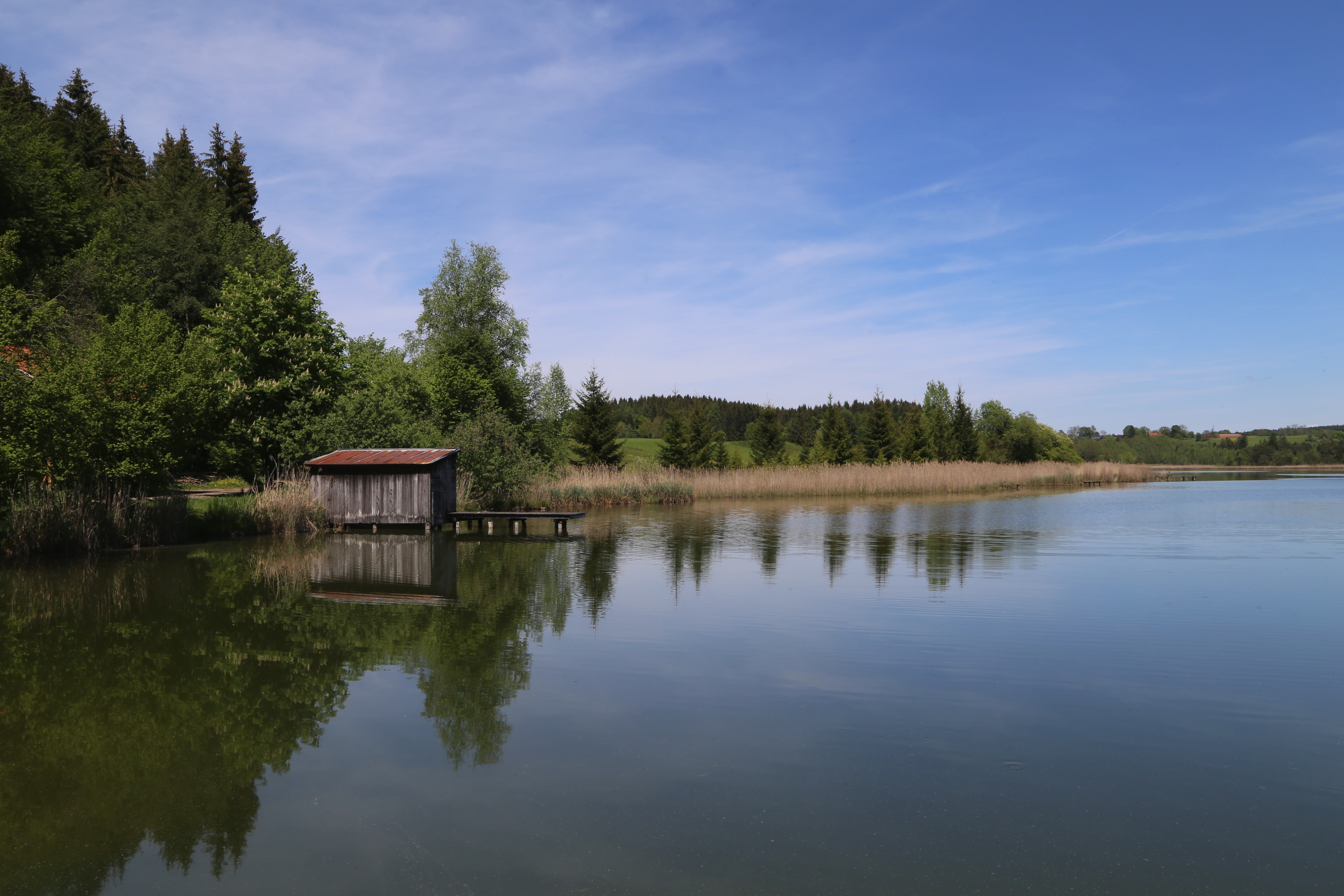 Harmatinger Weiher; Landschaftsschutzgebiet „Großer Weiher (Harmatinger Weiher)“, LSG-00326.03